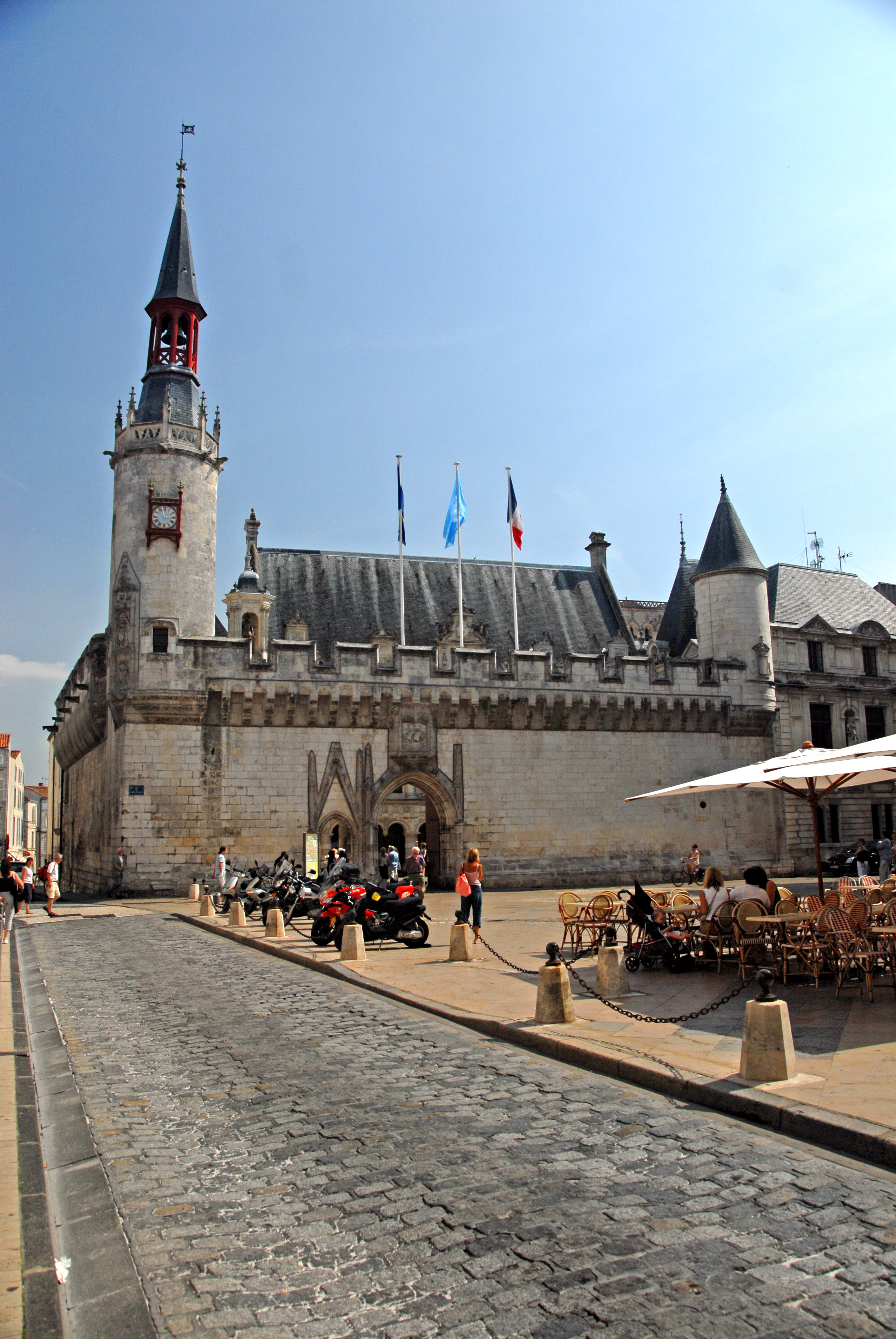 La Rochelle, Rathausmauer mit Belfried